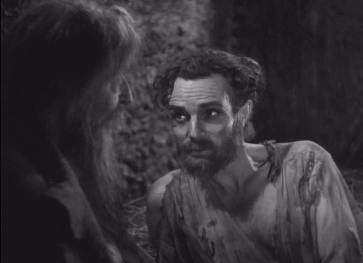 Screenschot :Il conte di Montecristo (Le Comte de Monte Cristo),film del 1943 diretto da Robert Vernay e Ferruccio Cerio